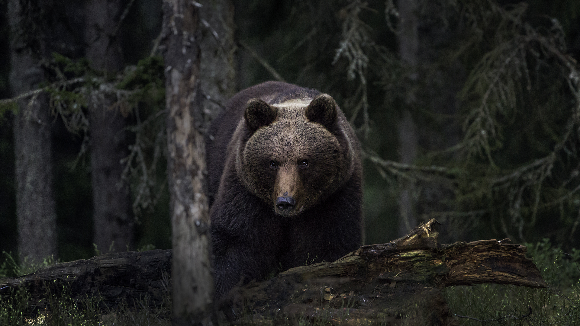 Norwegian: Brunbjørn